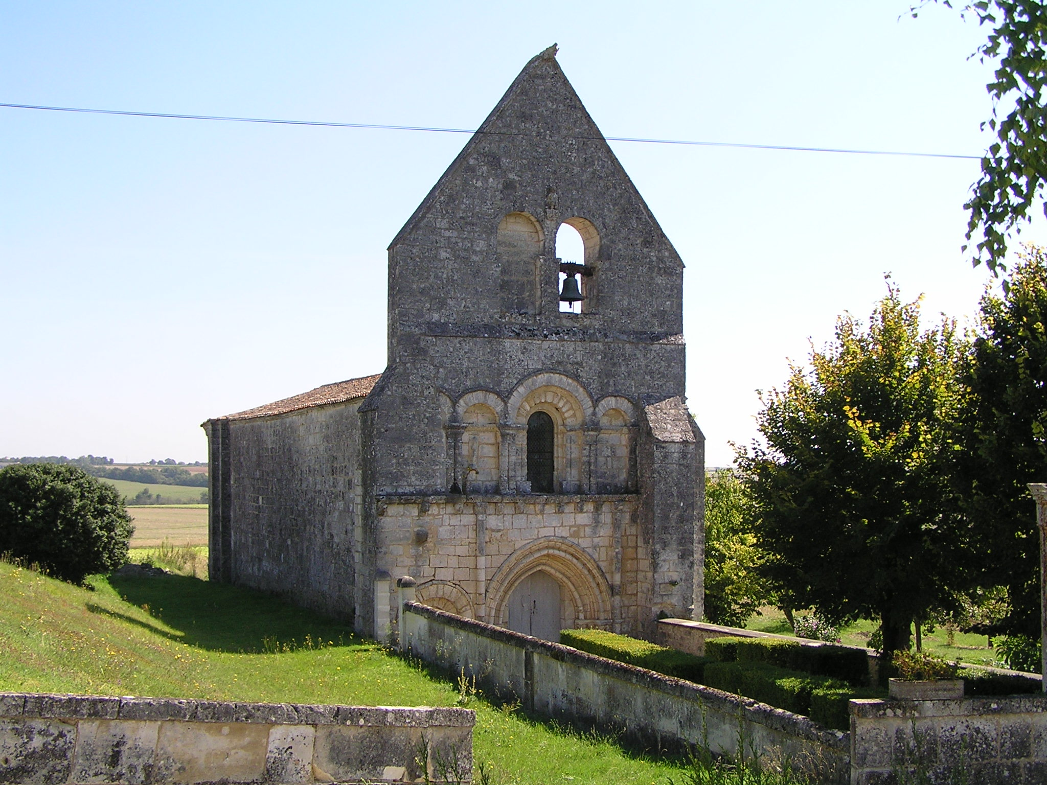 église d'Eraville, Charente, France